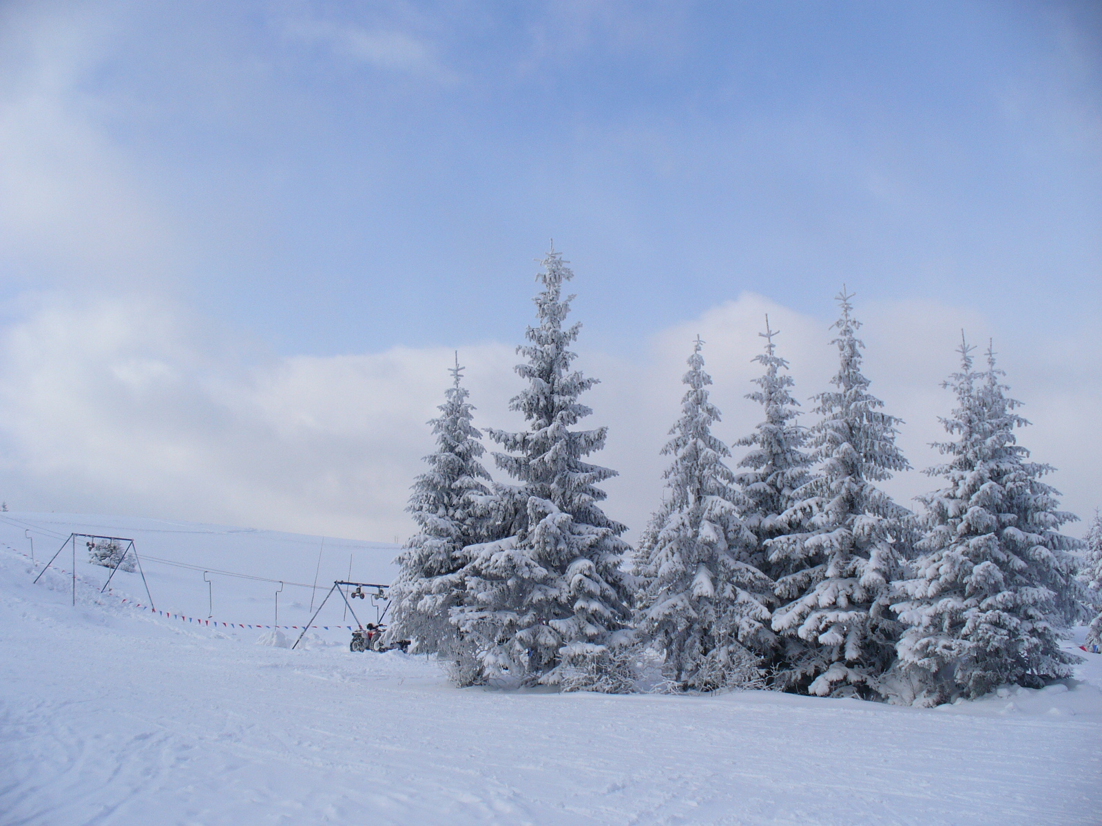 Winter in Żywiec Beskids, Poland.